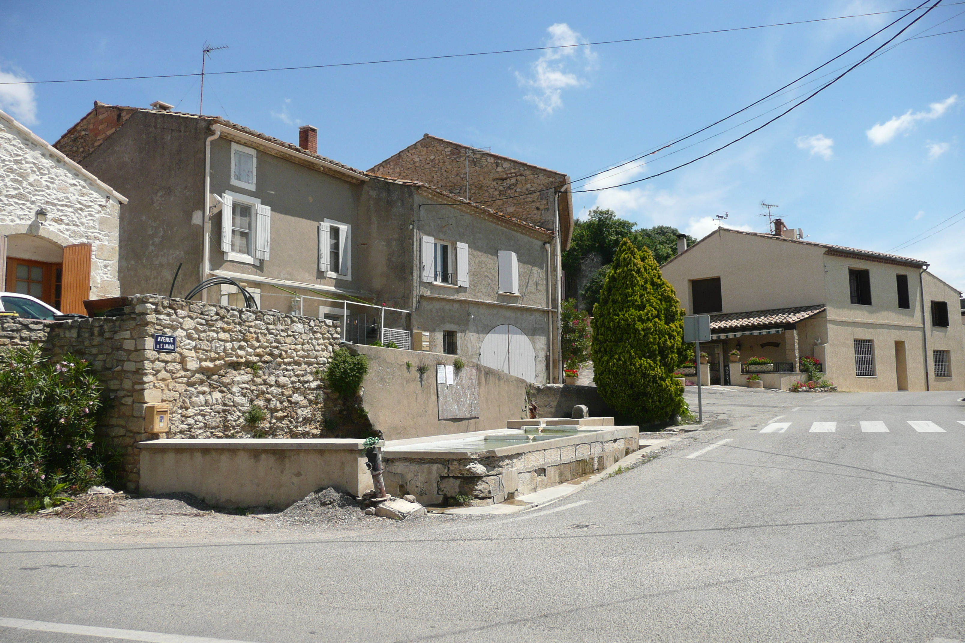 Théziers.